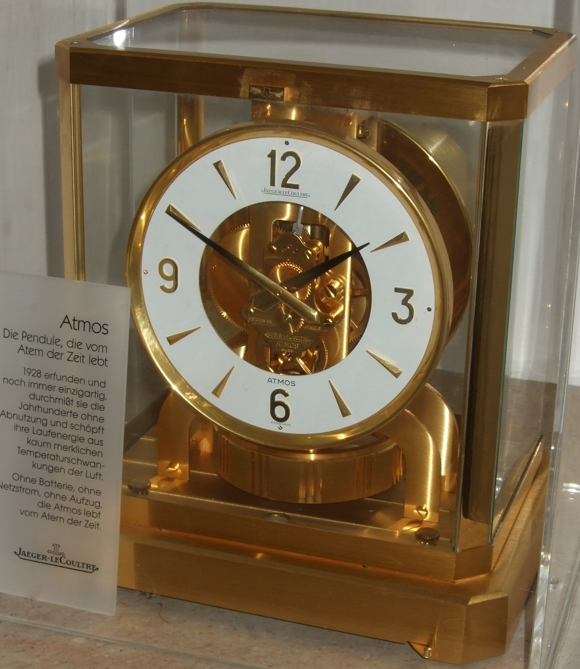 Atmos. Diese Uhr wird über eine Barometerdose von den Luftdruckschwankungen aufgezogen und in Gang gehalten. (Ausstellungsstück der Uhrensammlung Karl Gebhardt in Nürnberg )